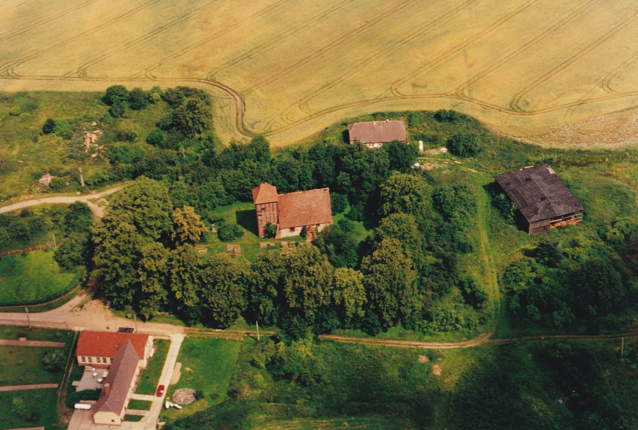 Lage der Dorfkirche Ruest